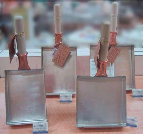 tamagoyakiki(卵焼き器/玉子焼き器). tamagoyakinabe. makiyakinabe. for "tamago-yaki(卵焼き/玉子焼き"